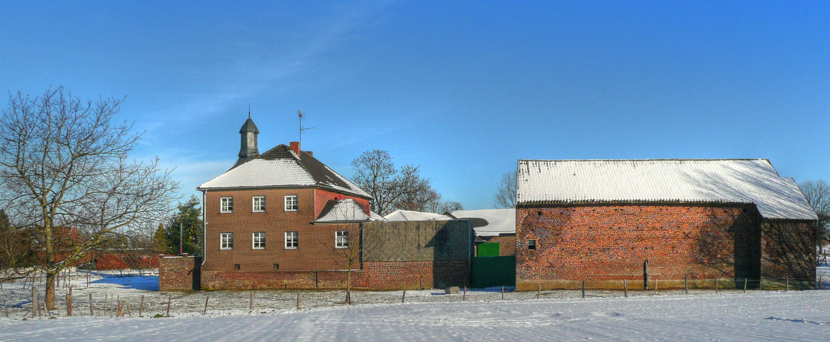 Haus Pesch (zu Pier zugehörig)